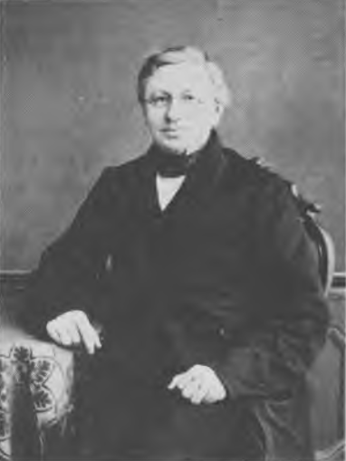 Portraitgemälde von Anton Franz Johann Russell, Amtsrichter, Landtags- und Reichstagsabgeordneter